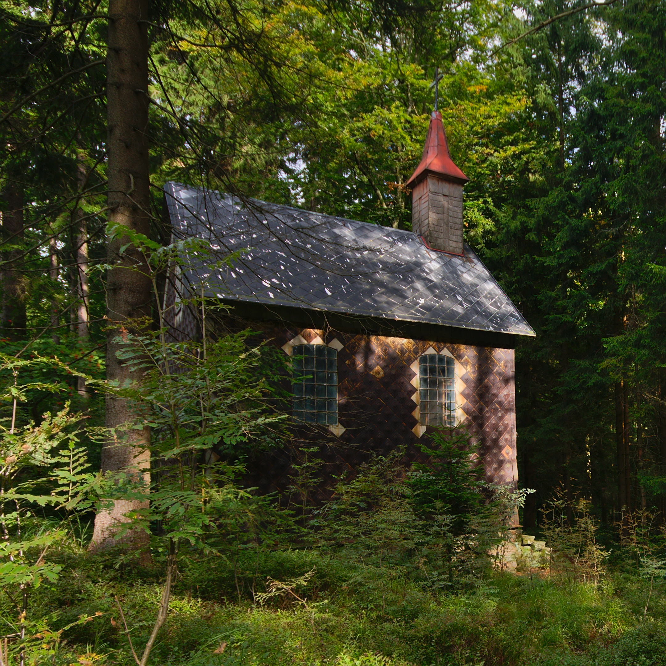 Kaple svaté Anny, Hadinec, Bartošovice v Orlických horách, okres Rychnov nad Kněžnou